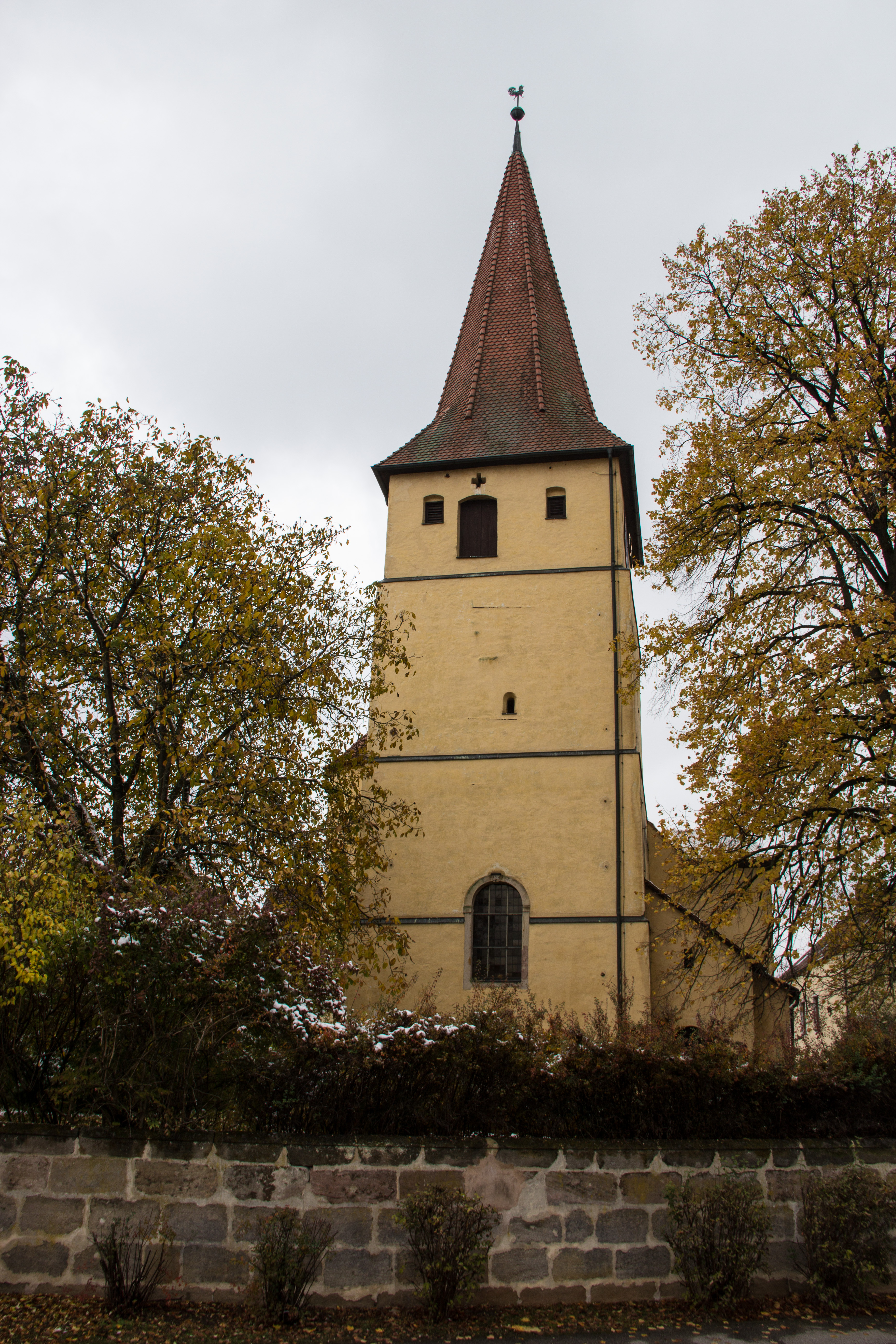 Evang.-Luth. Pfarrkirche St. Maria in Oberferrieden